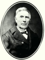 Porträt des Aachener Arztes und Gründers des Franziskus-Xaverius-Vereins Heinrich Hahn